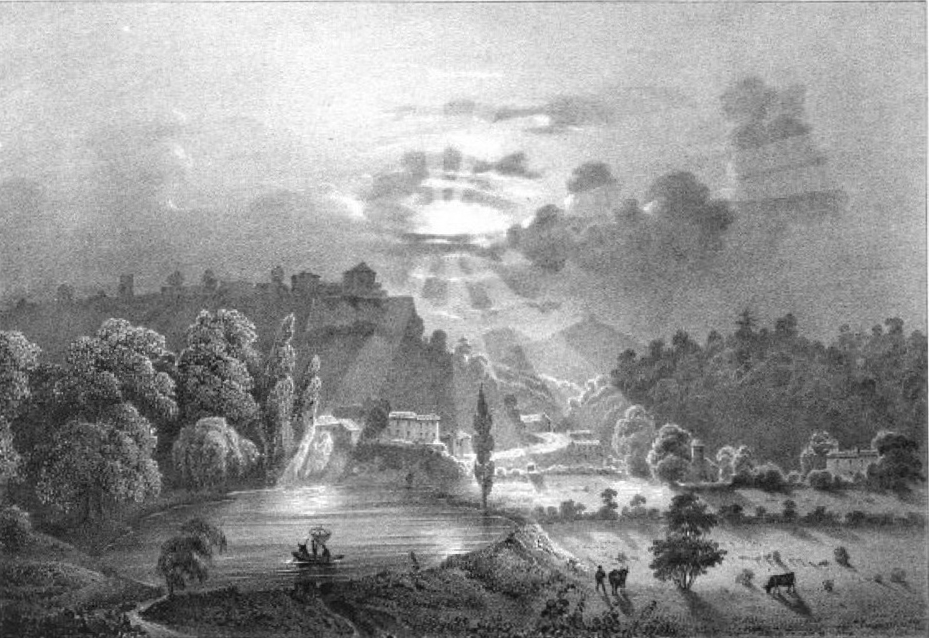 Album du Dauphiné - tome IV, litographie de Réaumont, près de Rives (Isère)